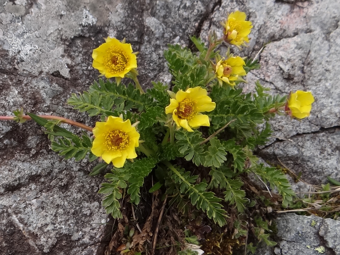 Geum reptans